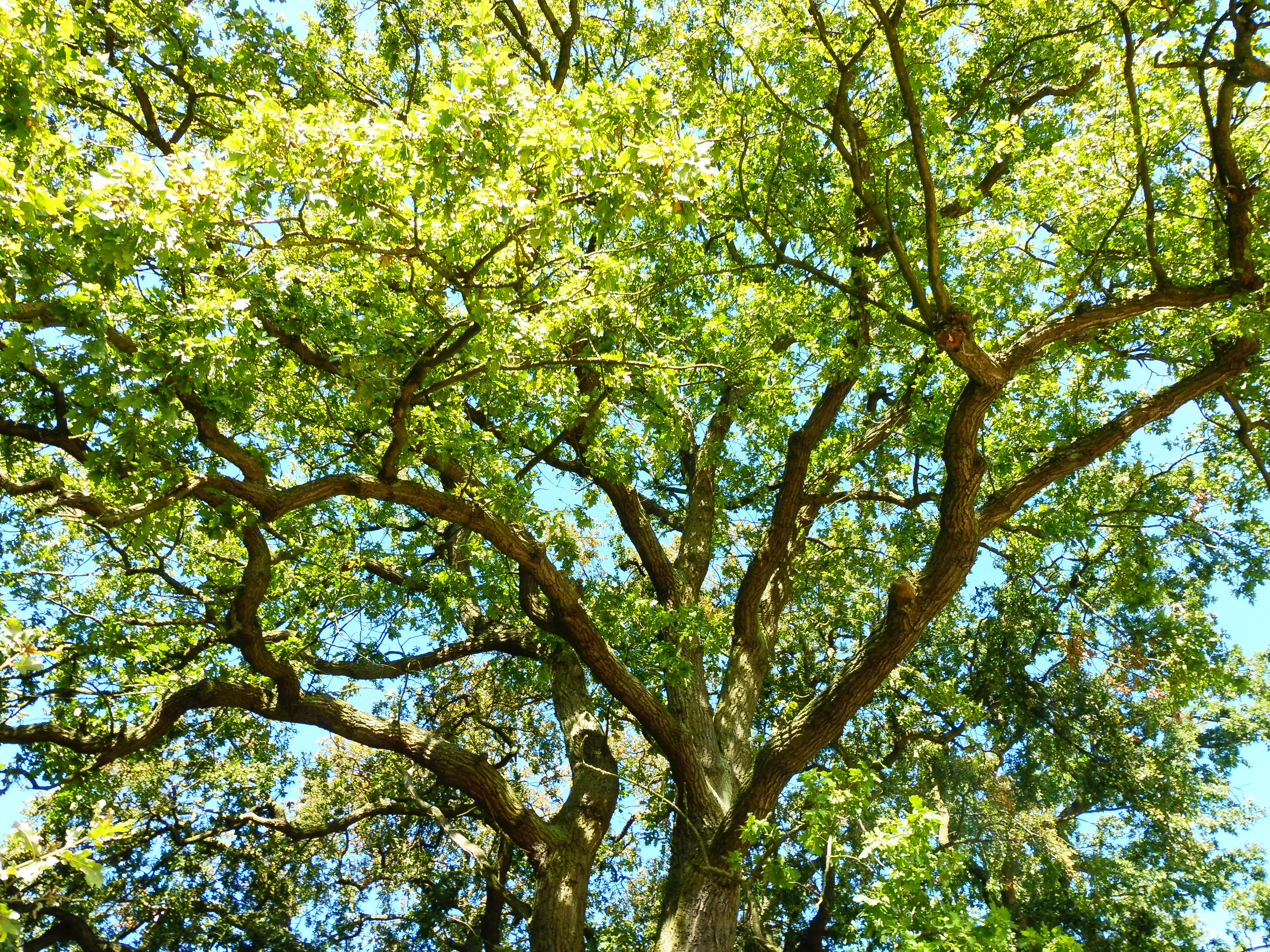 Krone einer alten Eiche beim Gutshaus Dambeck